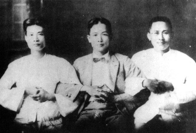 1930年，韓石泉、王受祿、蔡培火三人擬組織「新生堂財團」推展公益事業時合影